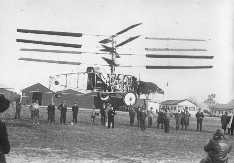 Ein neuartiges, senkrecht startendes Schraubenflugzeug ! Das Schraubenflugzeug ist eine verbesserte Construktion des spanischen Rotationsflugzeuges. Unser Bild zeigt das Flugzeug beim Start, wie es sich senkrecht in die Höhe erhebt. Information added by Wikimedia users.